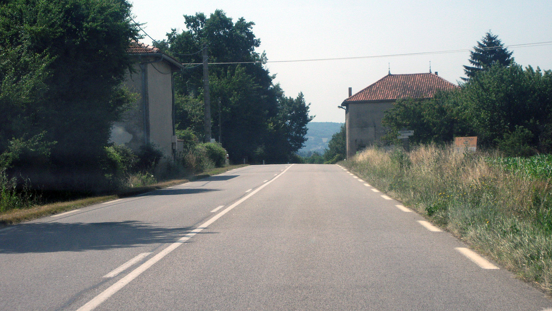 D 538 entre Revel-Tourdan et Beaurepaire en Isère. Route fermée le lendemain (étape du 100e Tour de France).